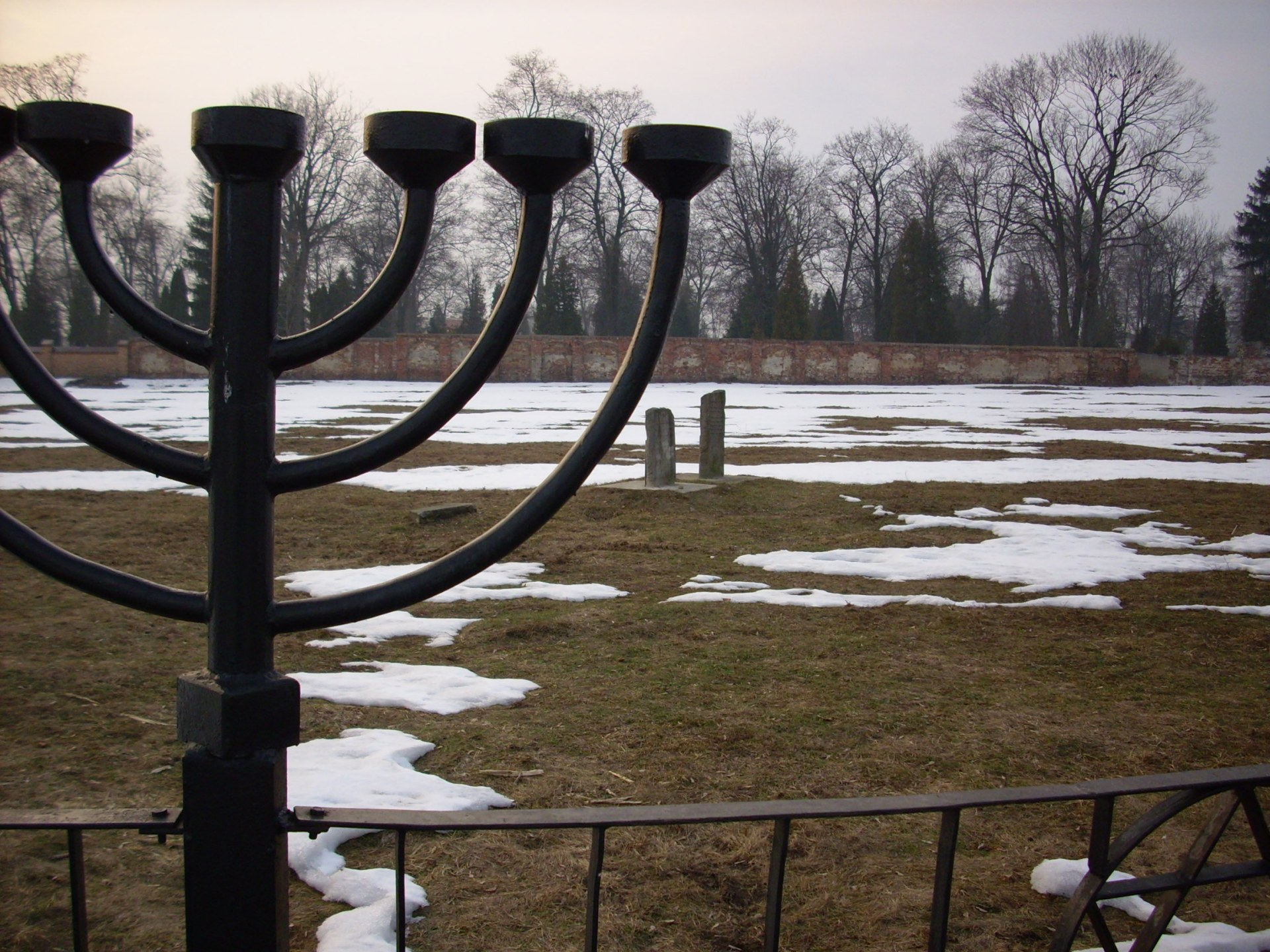 Cmentarz żydowski w Białej Podlaskiej.